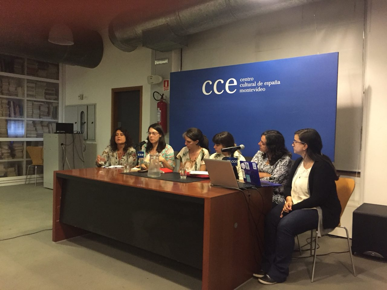 Panel sobre arte y feminismo, durante la realización de la editatona 'Arte y Feminismo en Uruguay 2018', el 16 de marzo de 2018, en el Centro Cultural de España en Montevideo. De izquierda a derecha, (1) Solana Quesada (Secretaría de Género de la Intendencia de Montevideo), (2) Mariana Fossatti (Wikimedia Uruguay), (3) Macarena Montañez (El Monitor Plástico), (4) Lucía Ehrlich (curadora de Jaque, artista performática y fotógrafa, e investigadora en estudios de género), (5) Ángela López Ruiz (Fundación de Arte Contemporáneo), y (6) Ileana Silva (Creative Commons Uruguay). Fuentes complementarias: (1a) Solana Quesada (consultora ; docente ; género y políticas públicas en la Intendencia de Montevideo) (1b) Entrevista con Solana Quesada el 8 de abril de 2014 (referente del 3er Plan de Igualdad de Género en Montevideo) (1c) 3er. Plan de Igualdad de Género (2014-2017): Montevideo avanza en derechos, sin discriminaciones (2a) Informe sobre la edición colectiva de artículos de Wikipedia en relación a mujeres en el arte y la cultura 2018: Montevideo Portal y Canal M entrevistan a Mariana Fossatti, integrante de Wikimedia Uruguay, para conocer de primera mano la organización de la Editatona (2b) Aportes de la #editatona de arte y feminismo que compartimos en marzo 2018 en el @CabildodeMvd, realización de Montevideo Inteligente (3a) El Monitor Plástico (3b) Alicia Pérez (gestión cultural y plataforma web) (3c) El informe Orletti: Conexión internacional (mayo de 2009) (4) Exposición Jaque, inauguración el 6 de marzo de 2018, hora 19, en el CCE de Montevideo (5) Estudios de género y danza en Pioneras del arte de acción I – La escena expandida (1962/1975) / Curaduría Ángela López Ruiz (6a) Equipo - Creative Commons Uruguay (6b) CC Uruguay en la Cumbre Mundial de Creative Commons (28-30 abril 2017) Otras imágenes en WikiCommons de este mismo panel